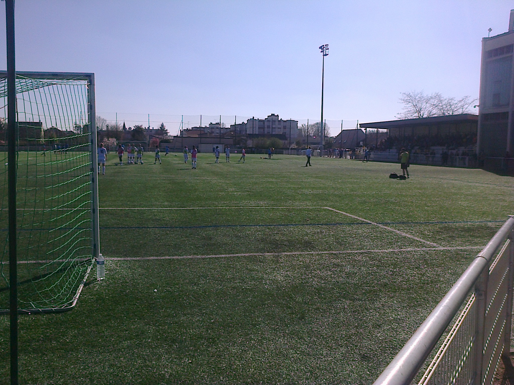 Stade des Corneilles avant la rencontre de 1/8 de finale de Coupe de France St-Maur-Juvisy du 16 mars 2014